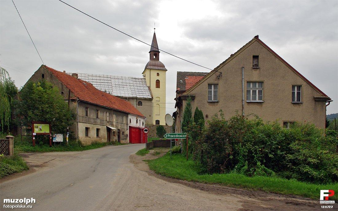 Ulica Piastowska. Od lewej remiza, Kościół Matki Boskiej Różańcowej i poczta.